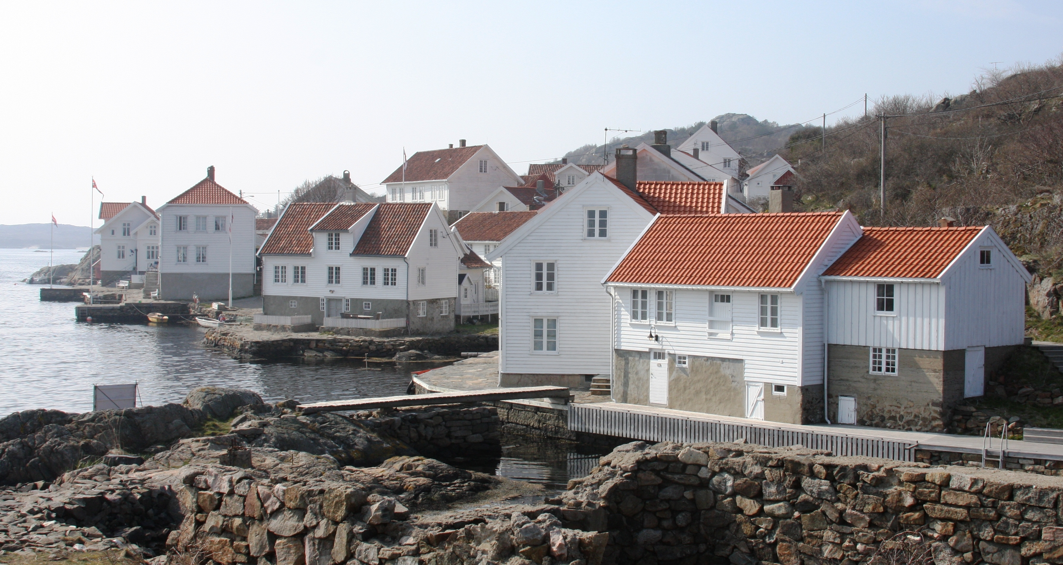 Loshavn lengst sørøst på Listalandet, Farsund kommune, Vest-Agder. Til venstre med valmet tak ligger det fredet e "Kaperhuset". Hele tettstedet har vernestatus.